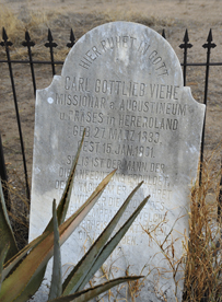 Grab des Missionars Gottlieb Viehe in Okahandja